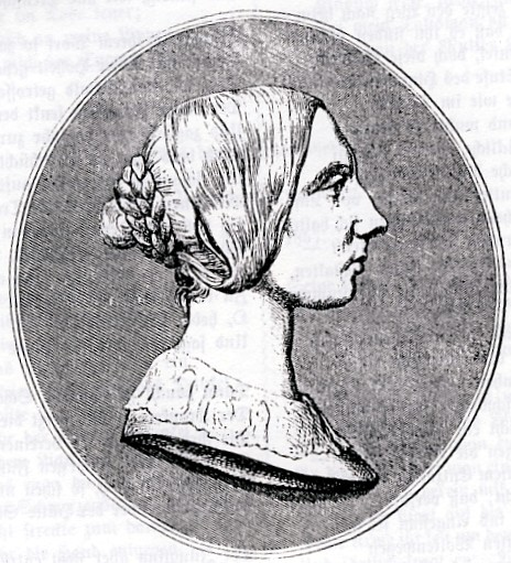 Portrait der deutschen Schriftstellerin und Komponistin Johanna Kinkel.